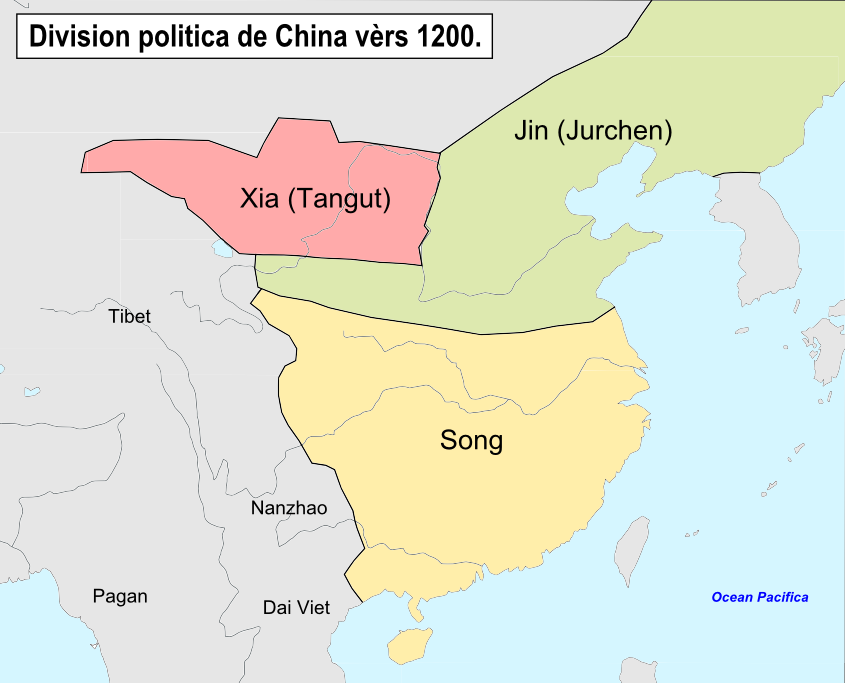 Division politica de China vèrs 1200.